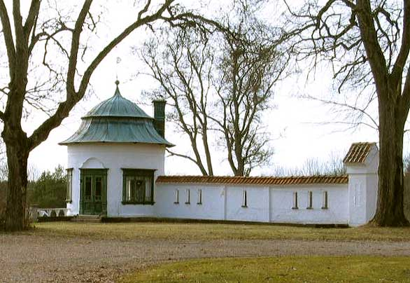 Paviljongen på Sickelsjö från 1903